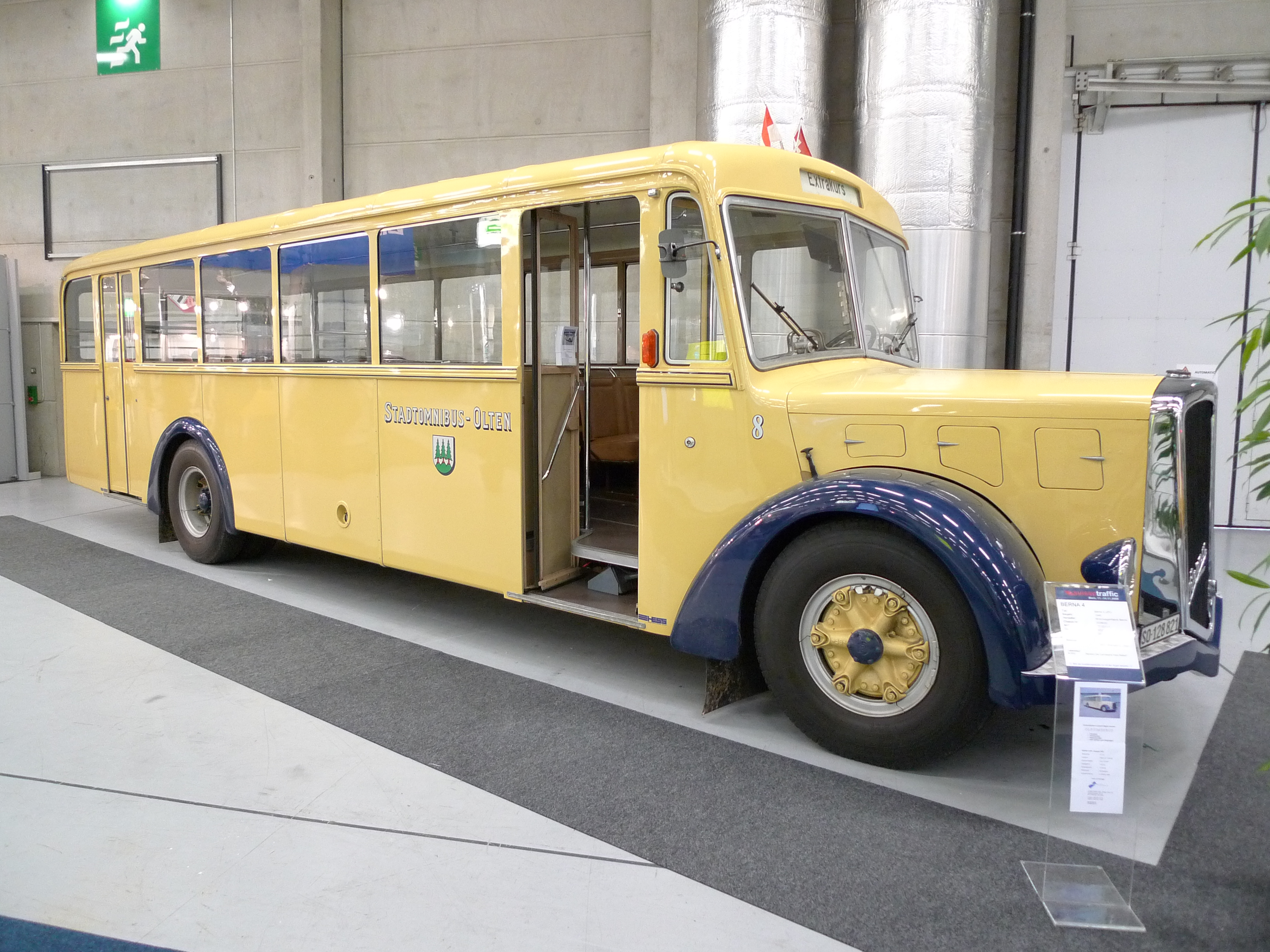 Berna Autobus 4 UPO, Baujahr 1946, Motor CT1D11-1, Sitzplätze 33, Stehplätze 24.